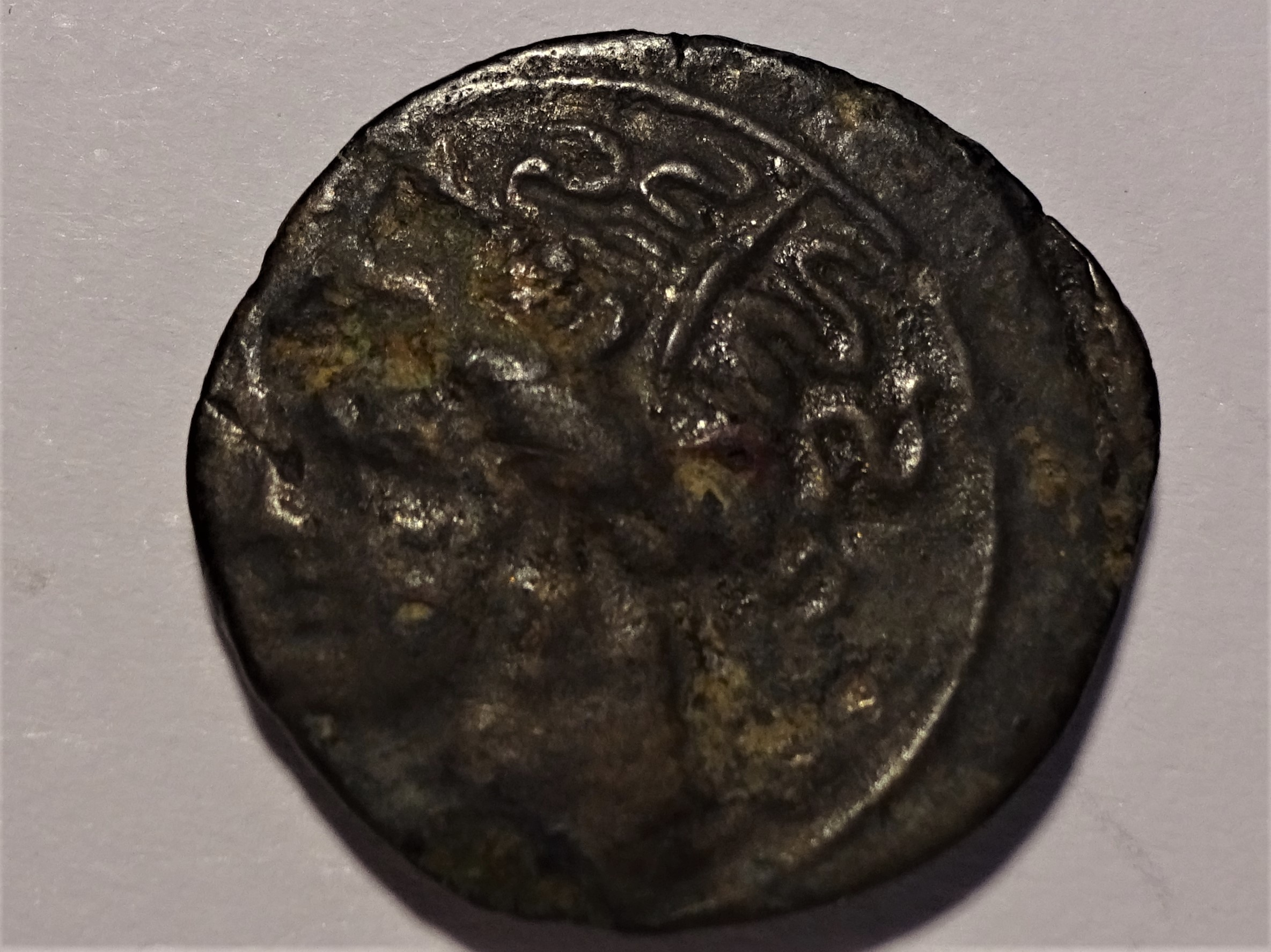 Bronzemünze der Karthager, Kopf der Tanit, spätes 4. Jahrhundert v. Chr., Szaivert/Sear Nr. 6580